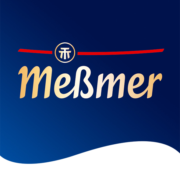 Meßmer Logo Stand September 2019